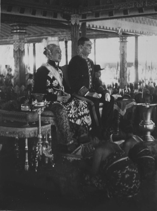 foto. Gouverneur Bijleveld met Sultan Hamengkoe Boewono VIII tijdens een bezoek aan de Kraton van de Sultan van Jogjakarta